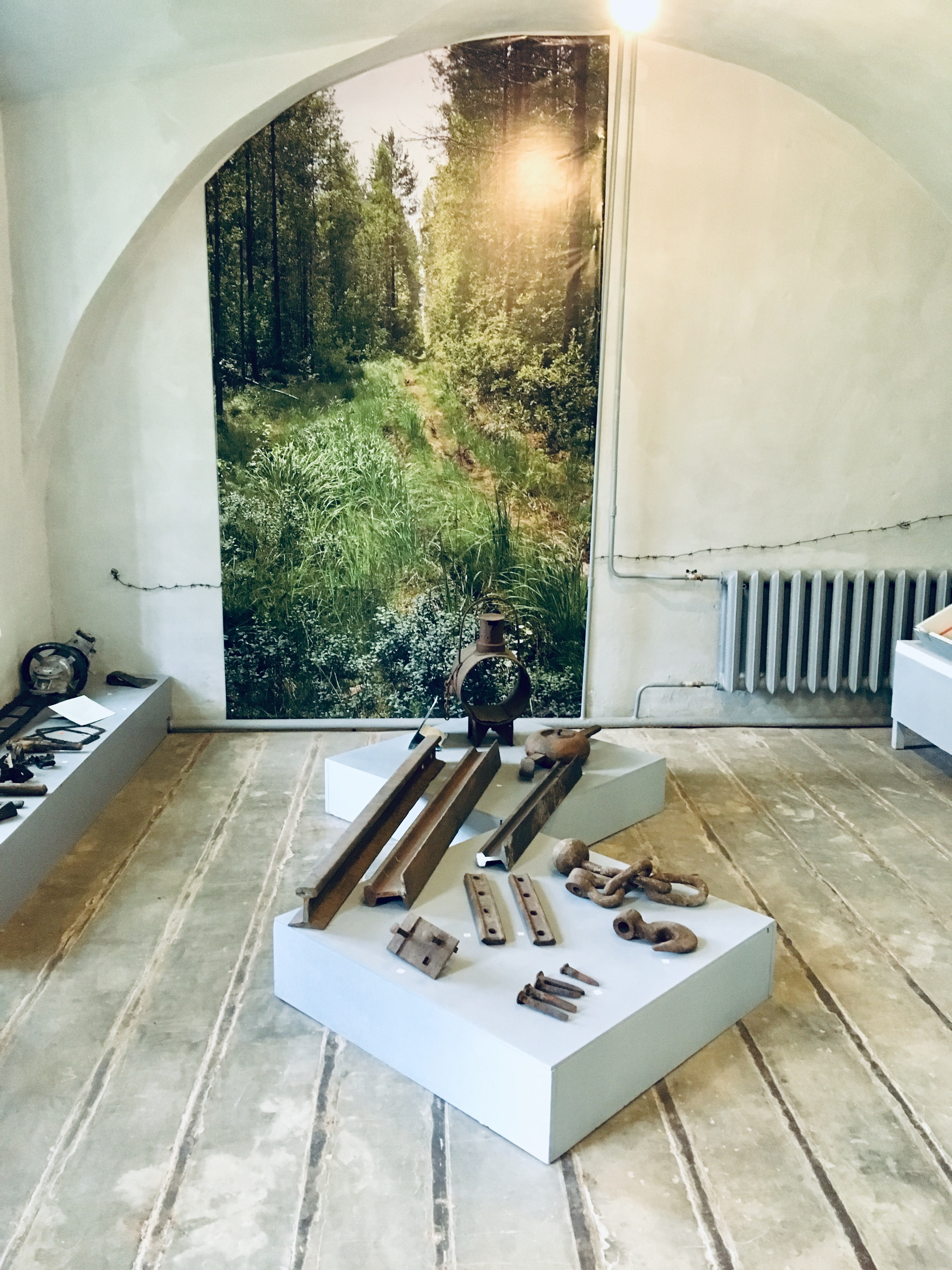 выставка музей унжлаг